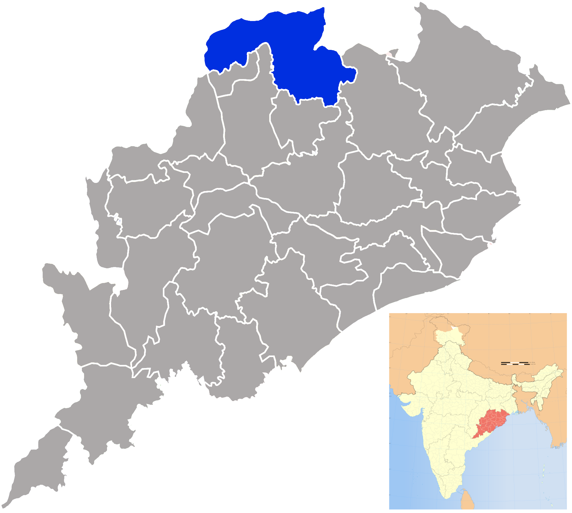 Distrito de Sundargarh en Orissa